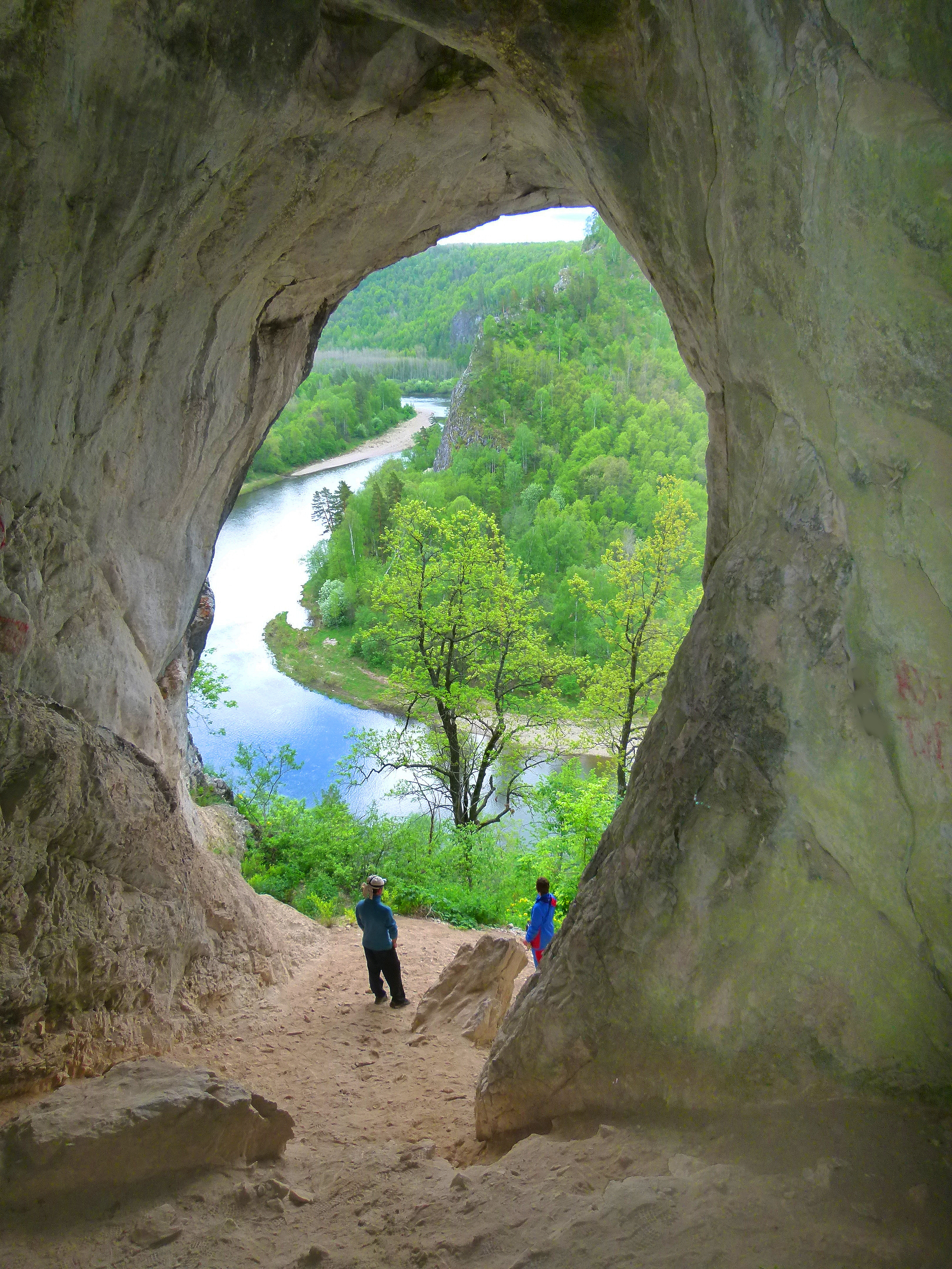 Башкирия: Национальный парк расположен на юго-западных склонах Южного Урала, к западу от водораздельного хребта Уралтау, в юго-восточной части Башкирии,Бурзянский район, Башкортостан This image is related to the protected area of Russia number 0200098